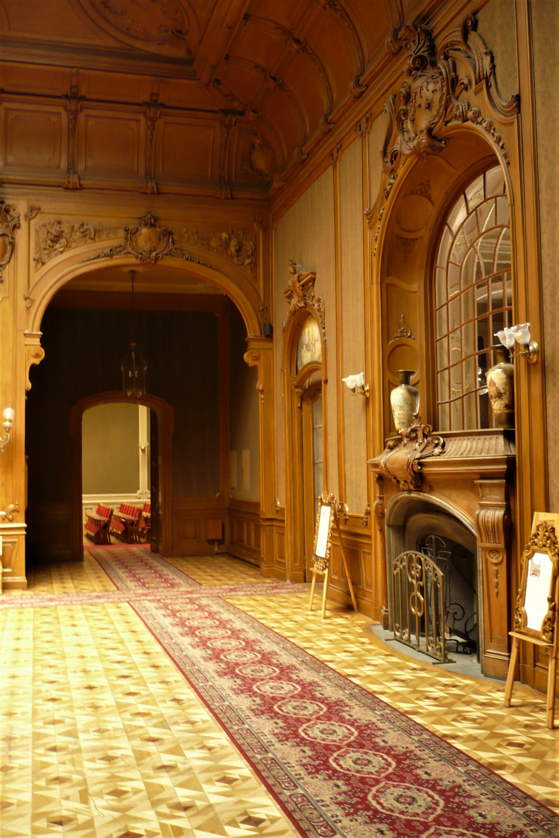 Kasyno Szlacheckie we Lwowie